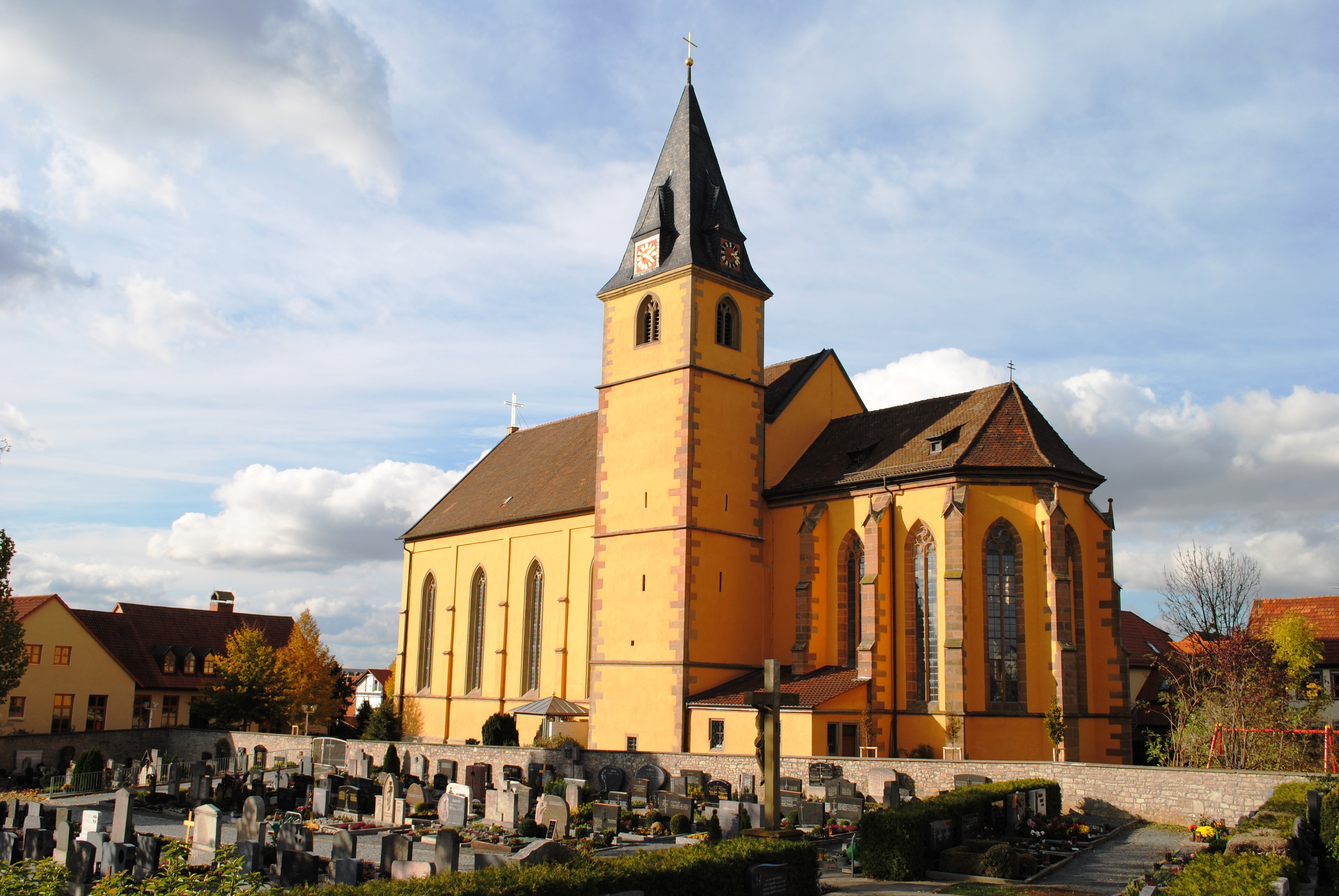 Kirche Heiligkreuz, Kirchgasse 8, Schwarzach-Stadtschwarzach, Saalbau mit eingezogenem Chor und südlich anschließendem Turm, Chor, 1467, Turm, 1424, das Obergeschoss, 1614, Langhaus neugotisch, 1868; D-6-75-165-48